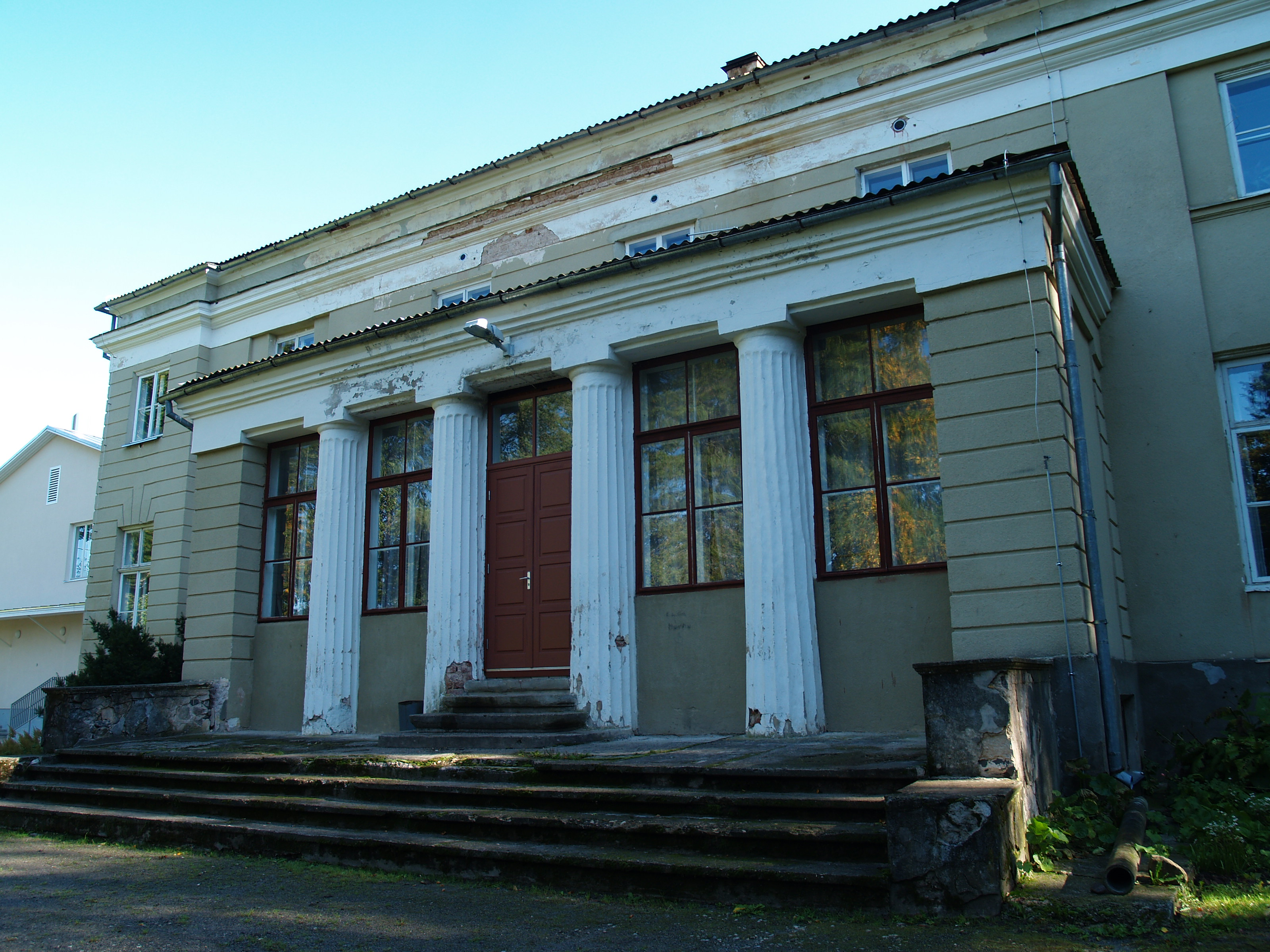 Vana-Kuuste mõis